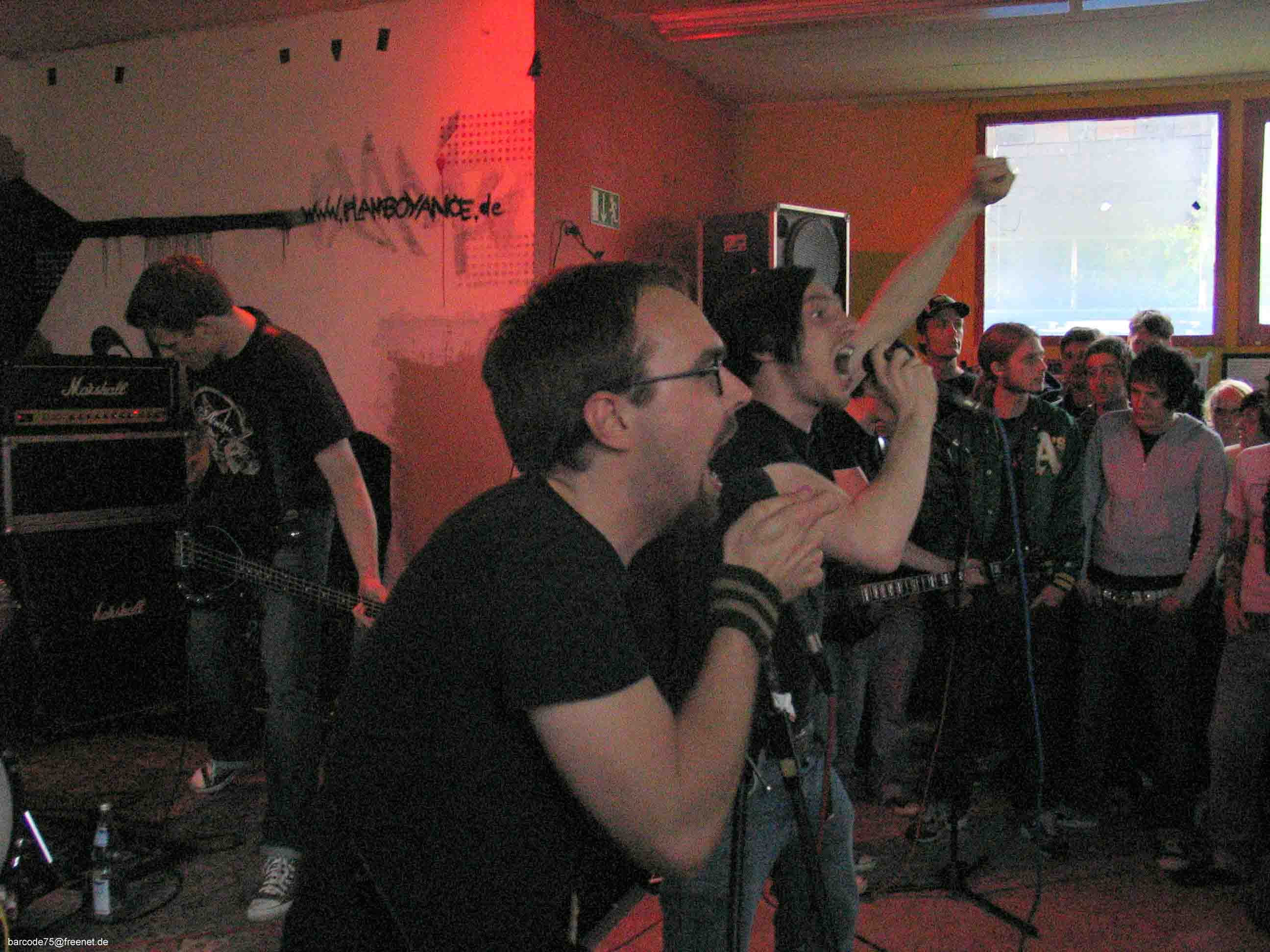 June 5, 2005 Baracke, MünsterKurhaus